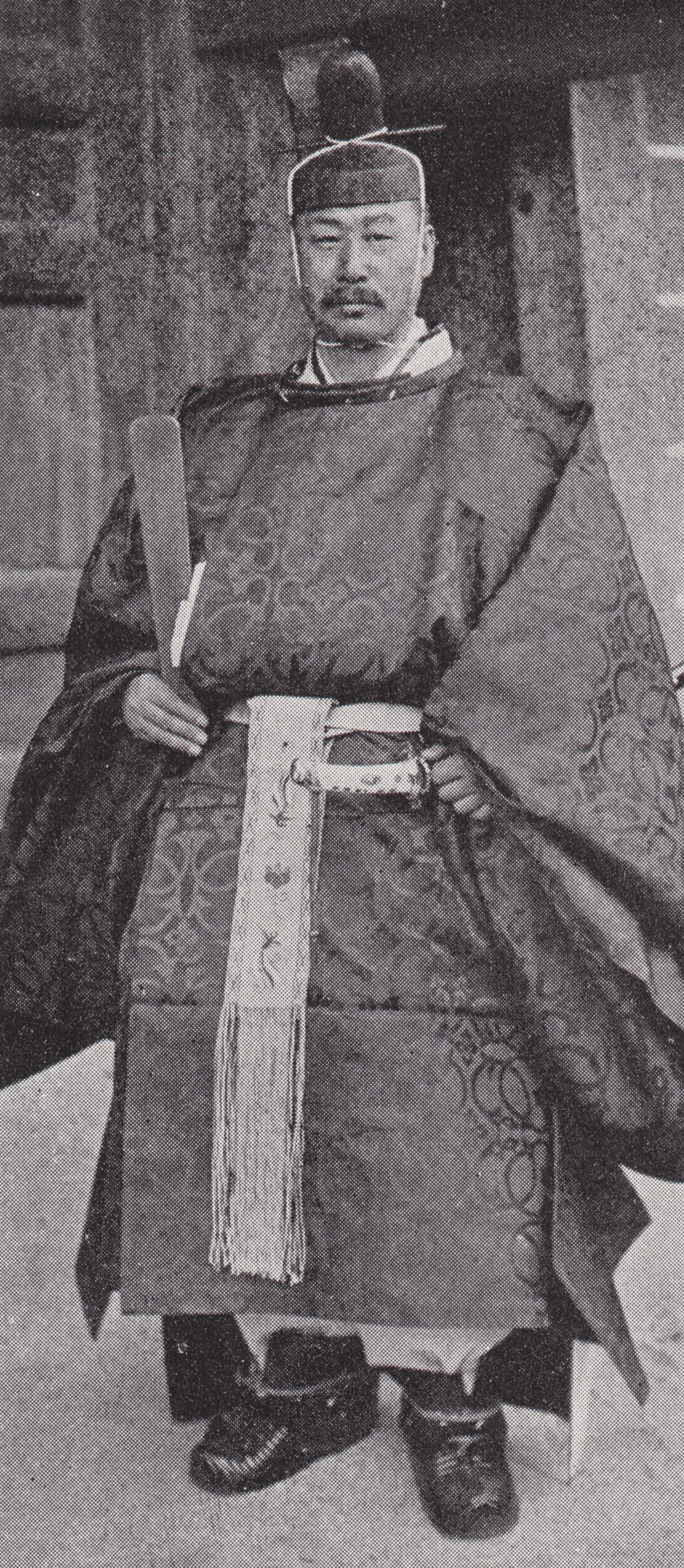 大礼使典儀官・子爵持明院基哲